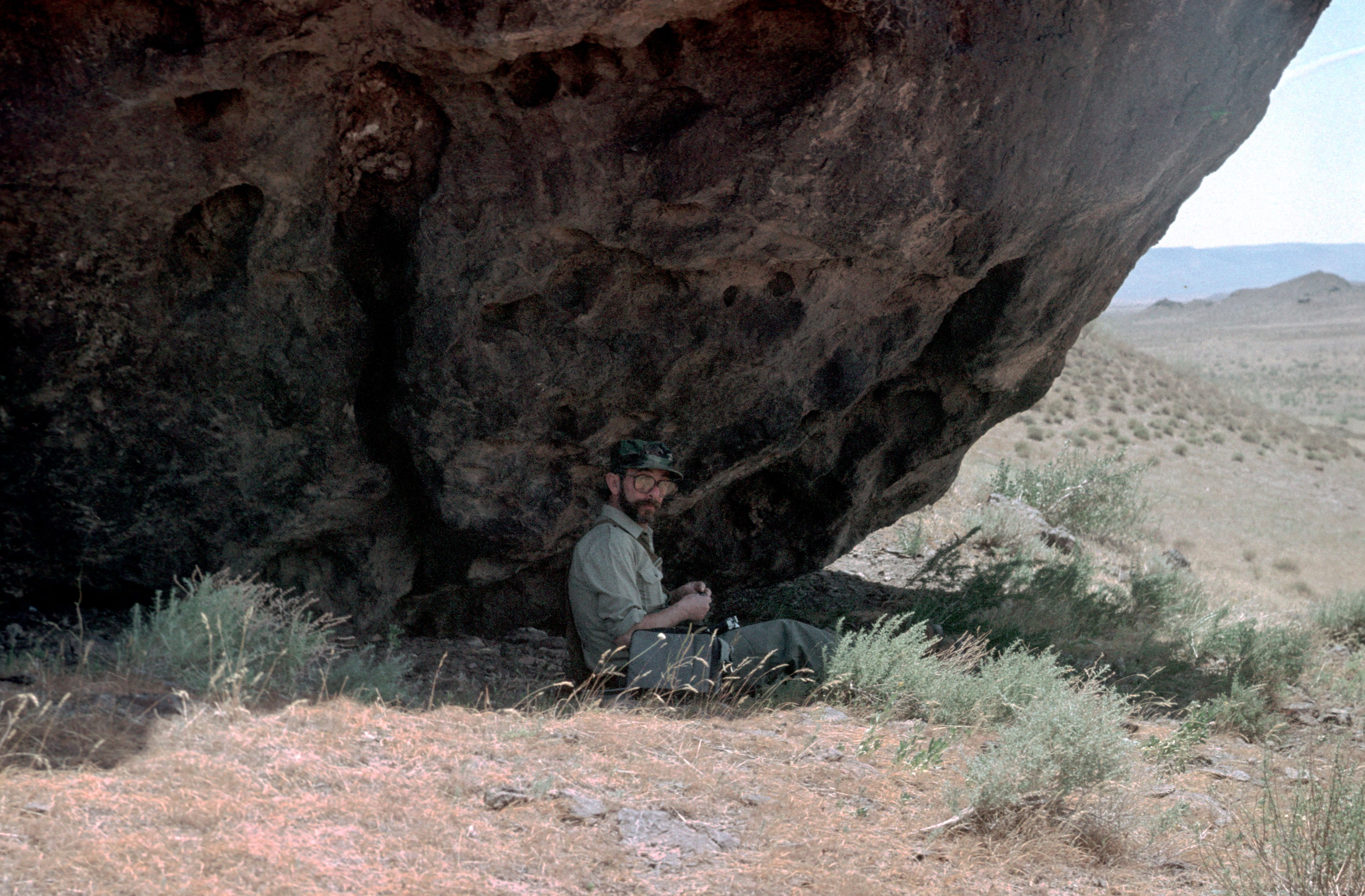 Зоолог Соломон Перешкольник перезаряжает фотоаппарат в тени. Туркмения